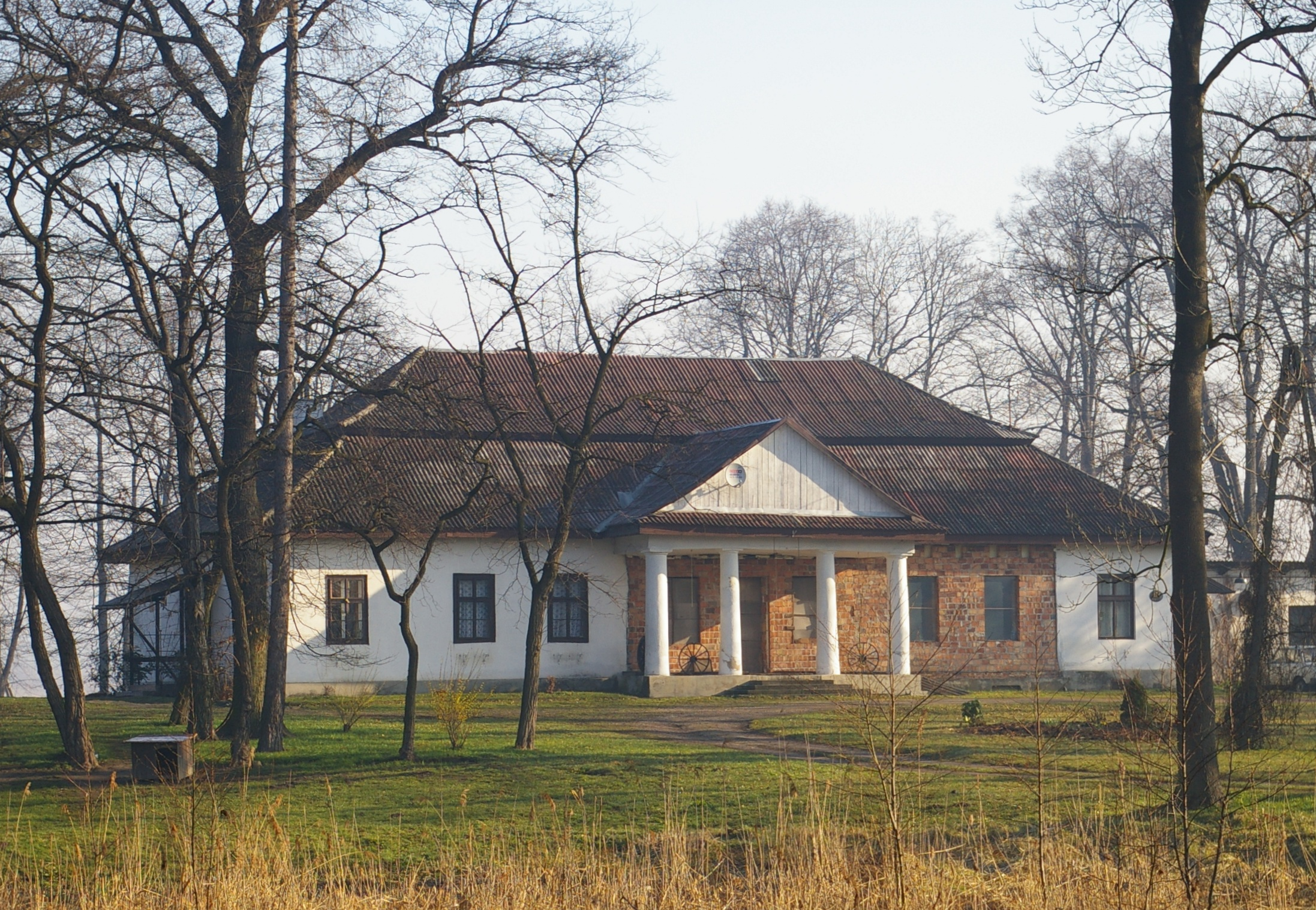 Klasycystyczny dworek z XIX wieku na Sidzinie w Krakowie